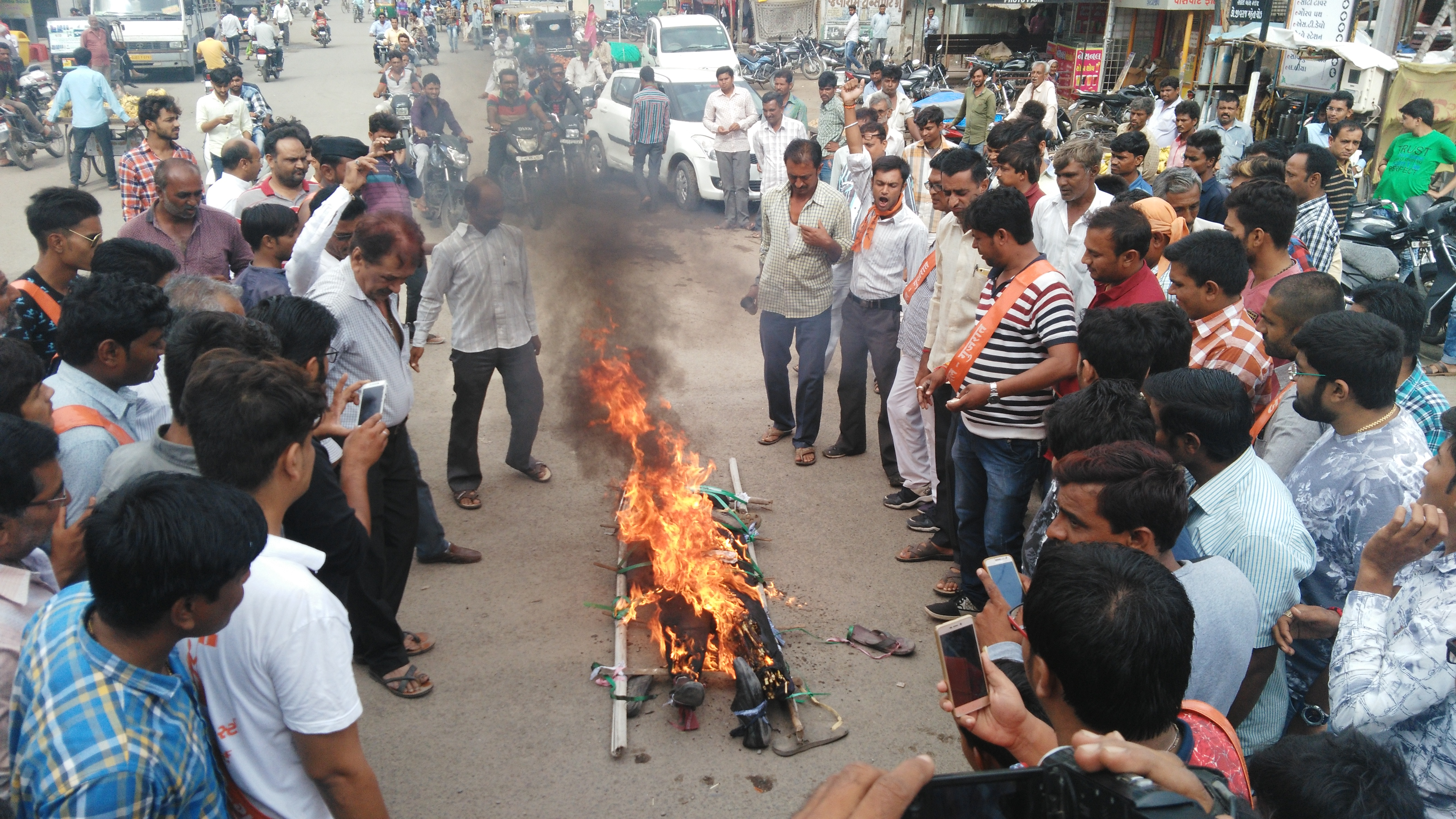 अमरनाथ यात्रा पे हमले का विरोध।